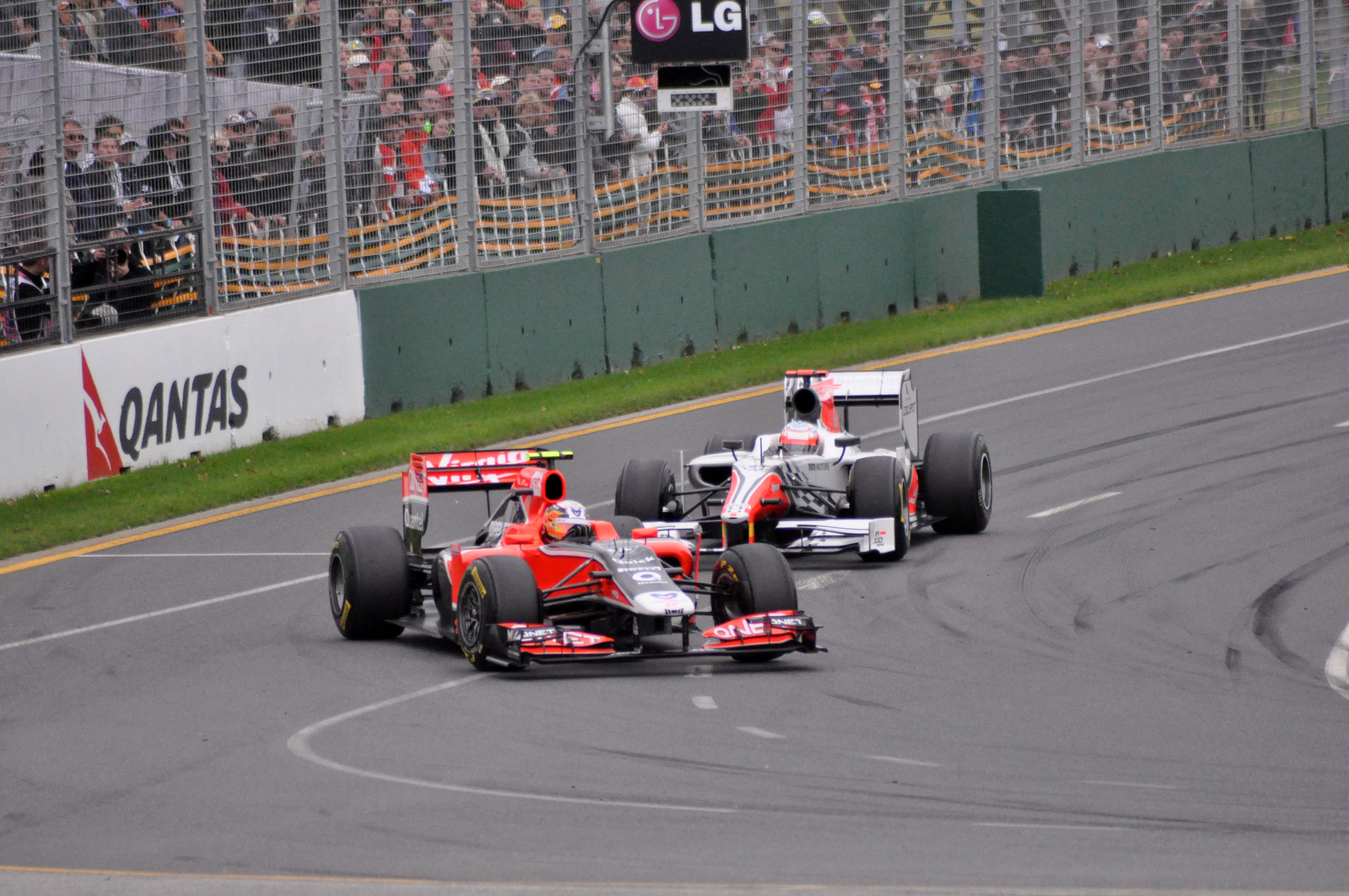 Aus F1 GP Weekend 2011 83